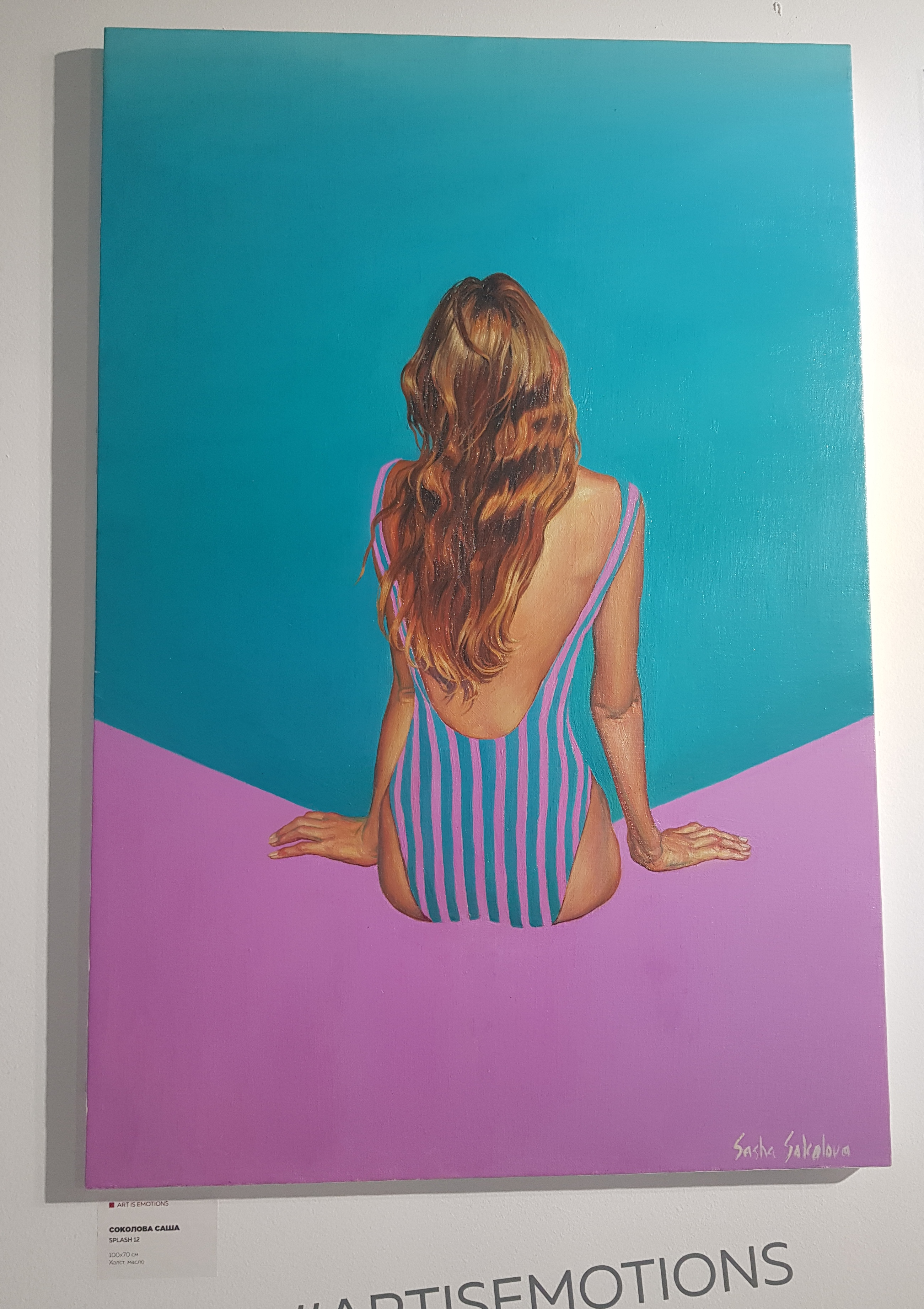 Фотография картины Саши Соколовой Splash 12 (100x70, холст, масло)